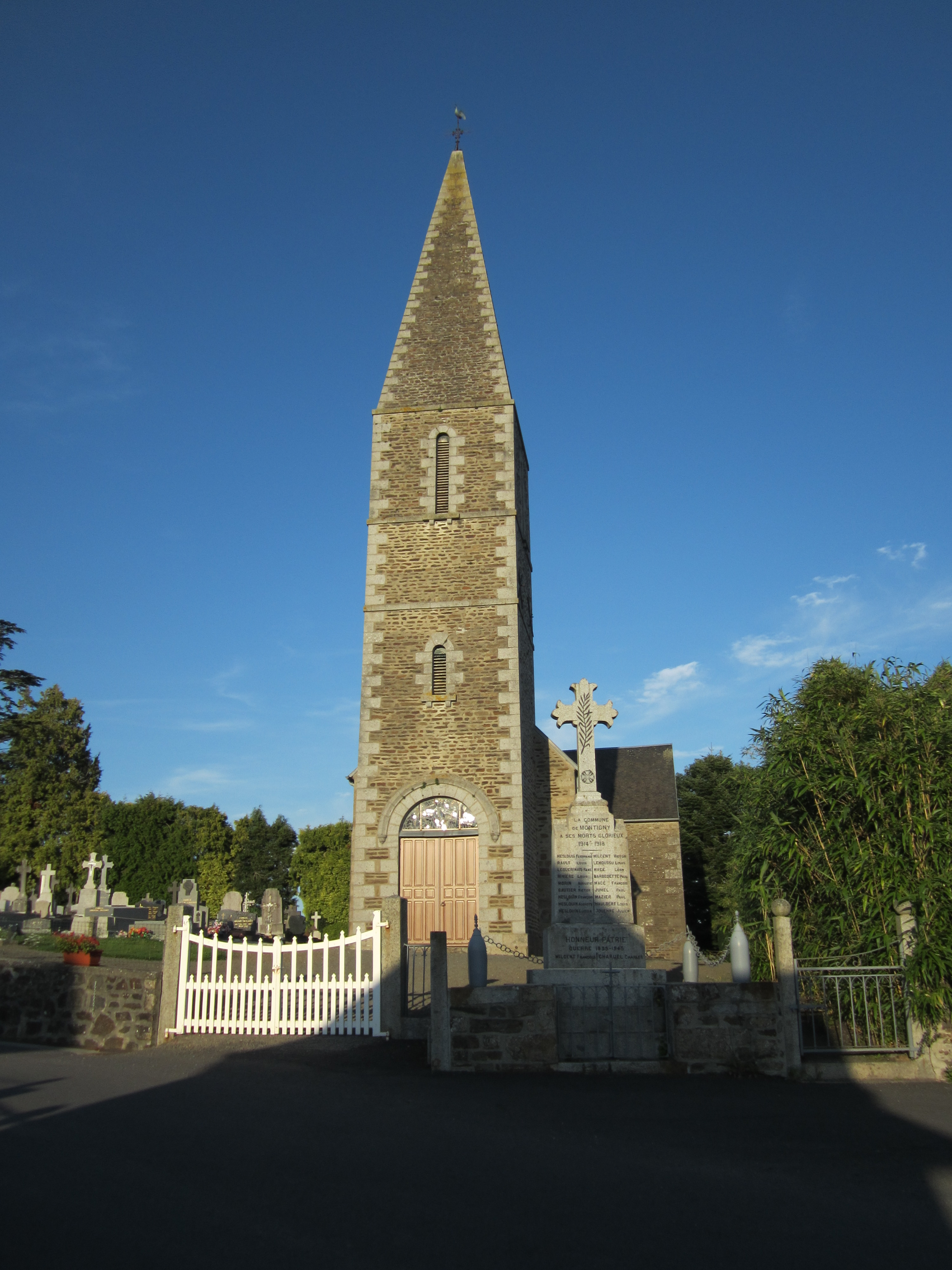 Montigny, Isigny-le-Buat, Manche